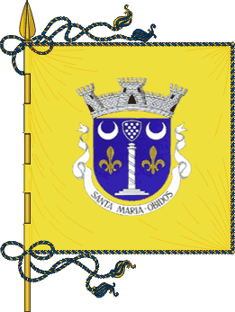 bandeira de Santa Maria